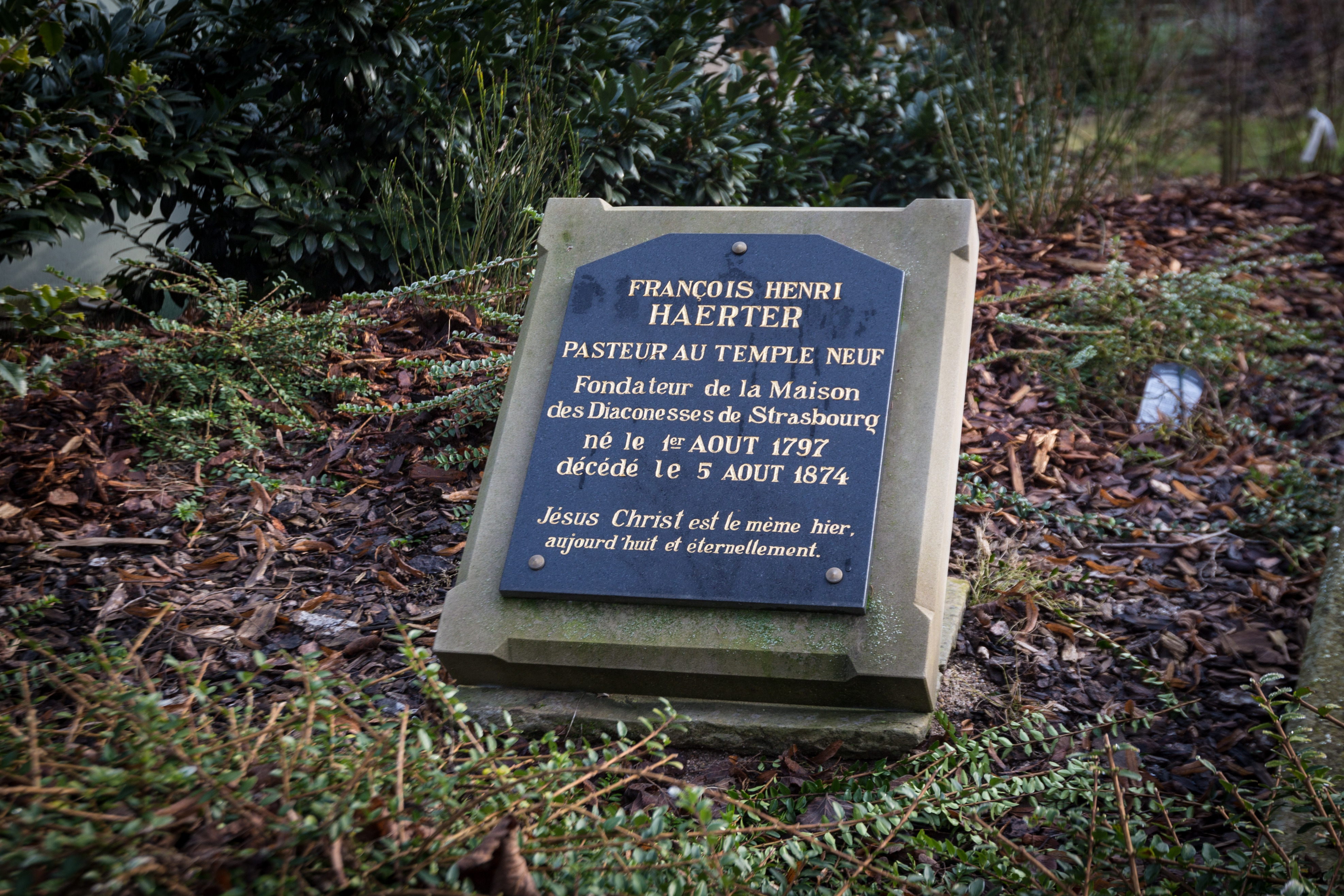 Koenigshoffen cimetière des diaconnesses sépulture François Henri Haerter